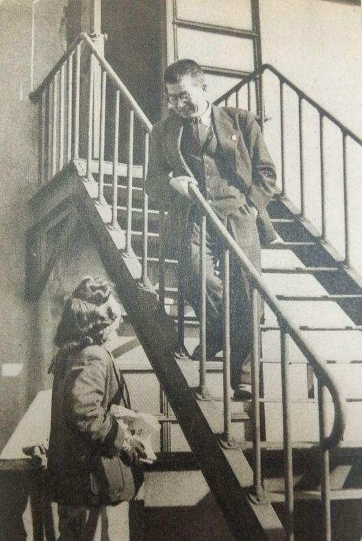 村山知義